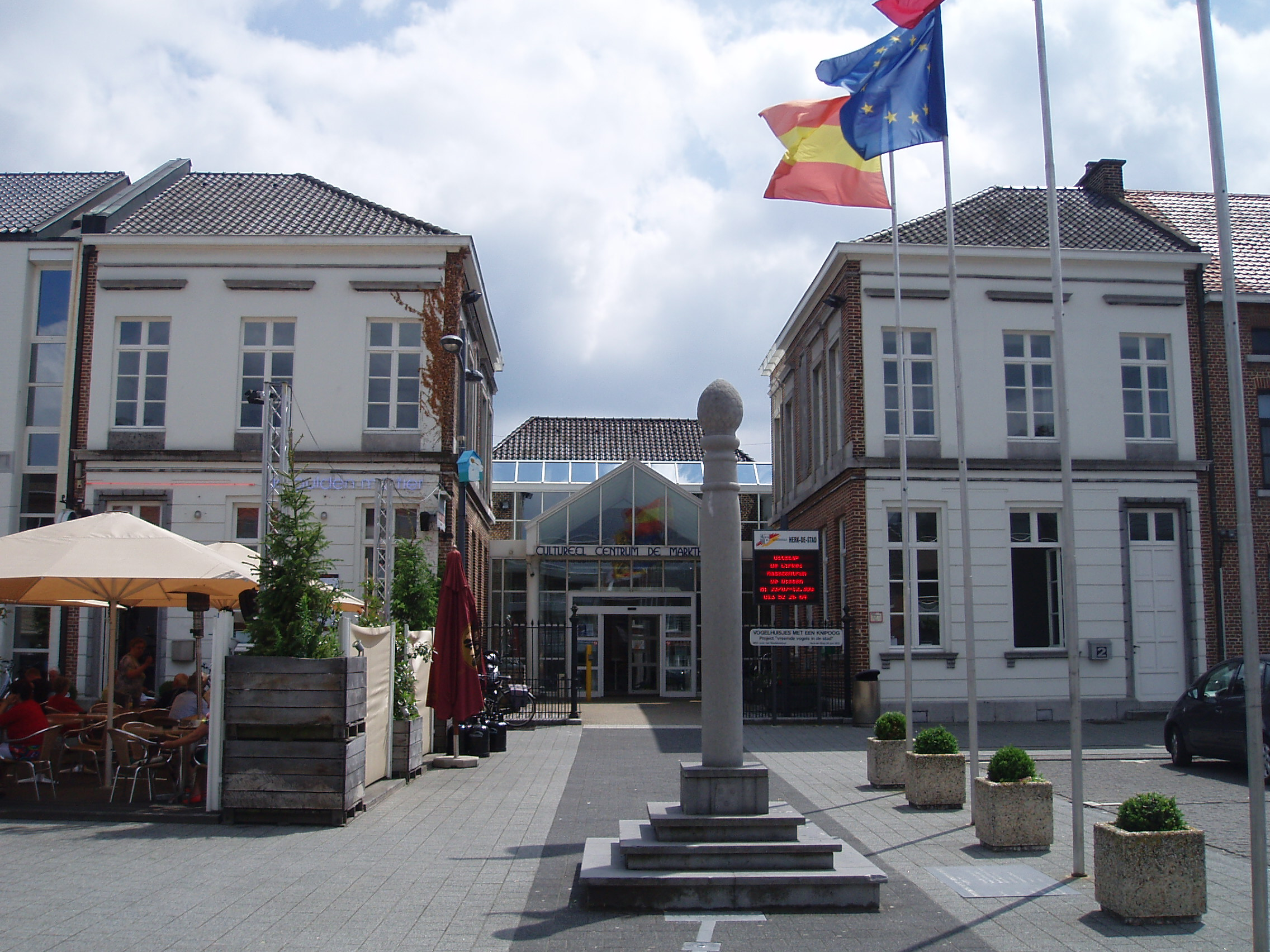 Voormalig gemeentehuis